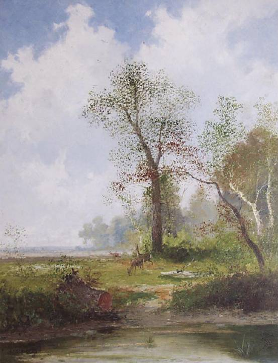 Landschaft